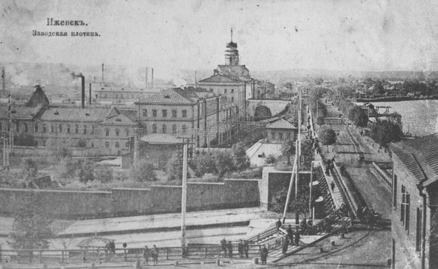 Поселок Ижевский завод. Вид на плотину со стороны здания Гауптвахты.